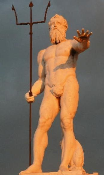 Dettaglio della Fontana del Nettuno a Messina, opera di Giovanni Angelo Montorsoli.